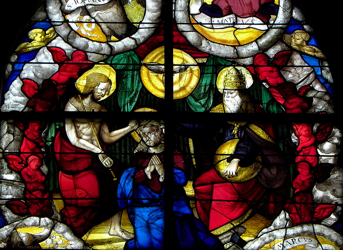 Baie 10 de la basilique Notre-Dame de La Guerche-de-Bretagne (35). Détail. Couronnement de la Vierge.